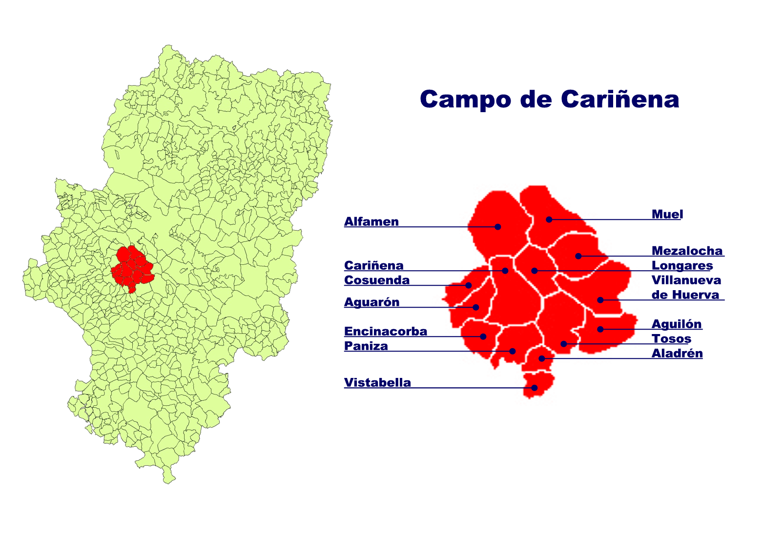 Comarca de Campo de Cariñena Creado el 21.10.2005 por Ecelan en base a Image:Aragon municipalities.png